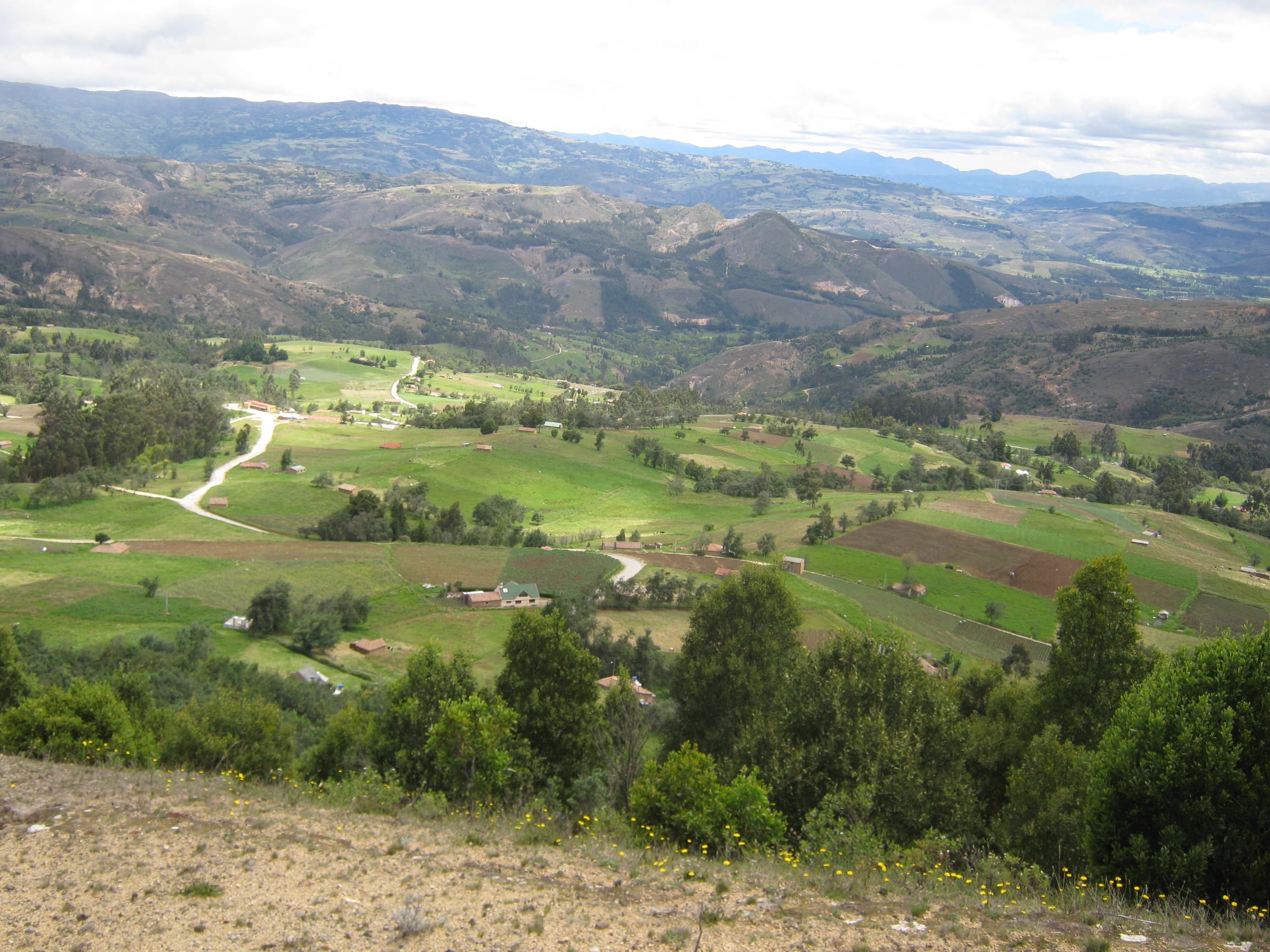 Imagen Tomada desde cerro de monserrate en Cuítiva